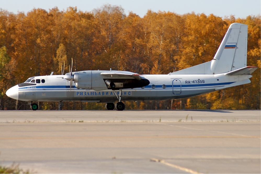 Ryazanaviatrans Antonov An-24